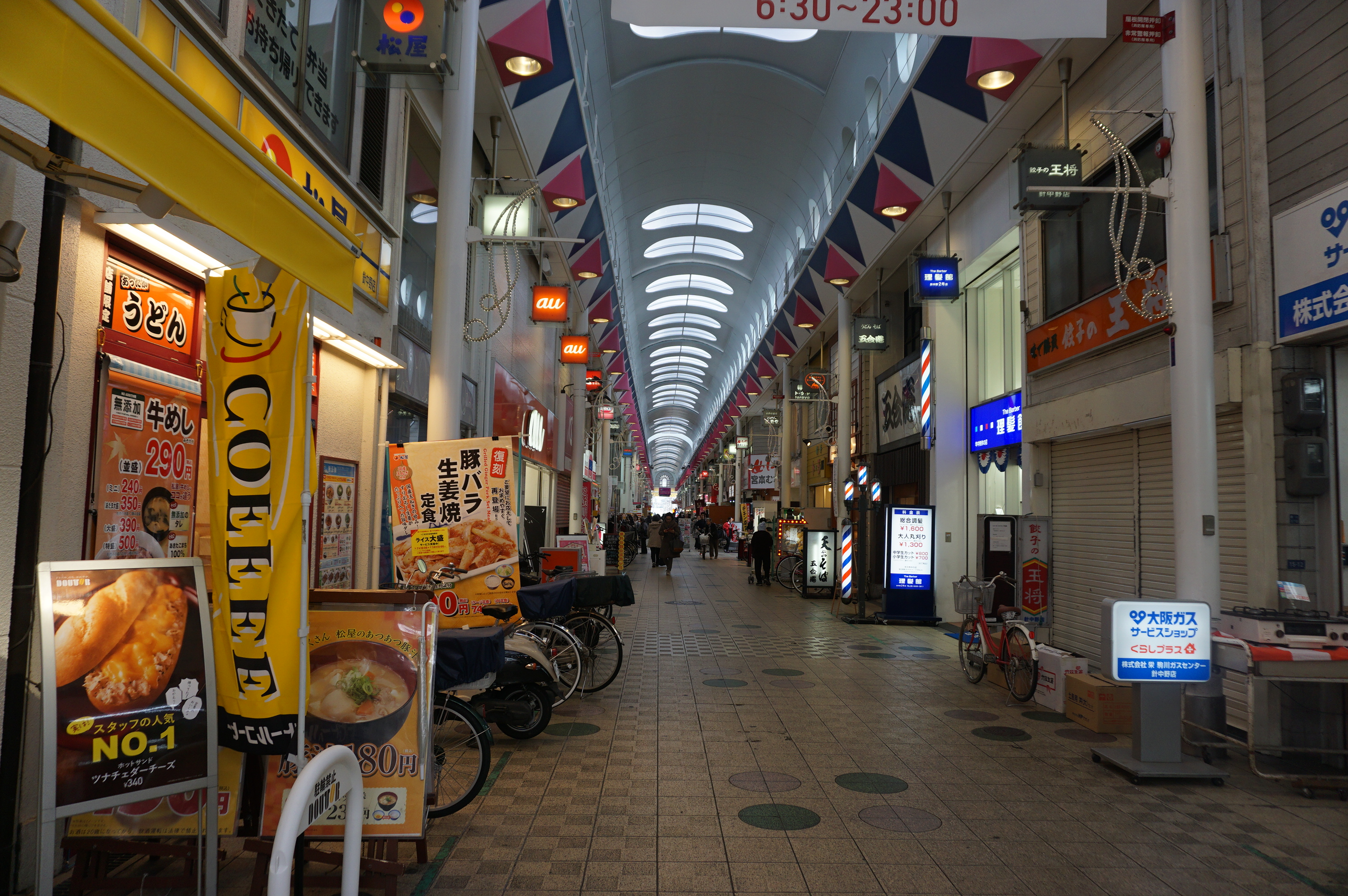 2017年2月撮影